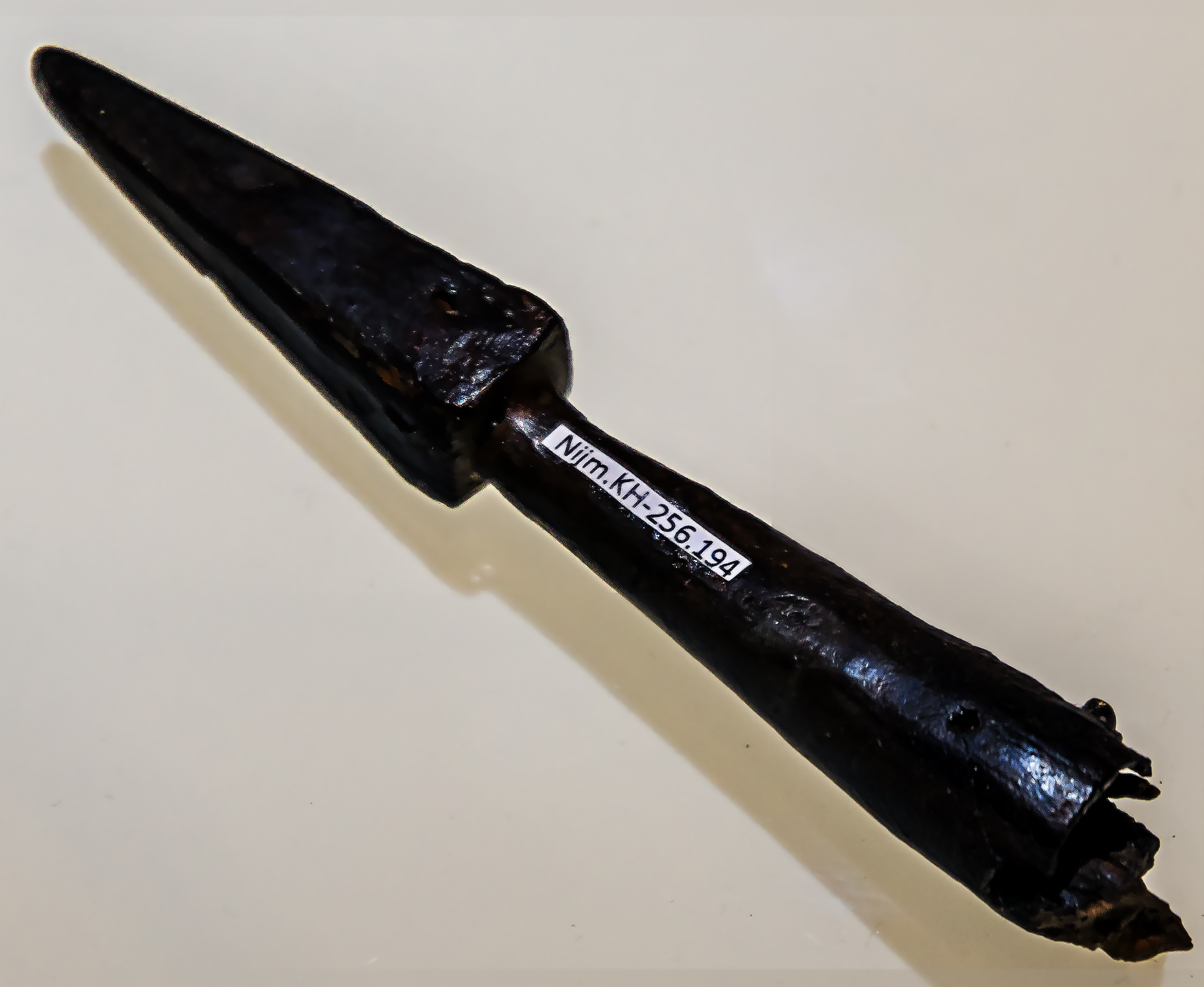 Pfeil- Bolzenspitze aus Eisen, die von einer römischen Balliste (Skorpion) abgeschossen wurde. Ausgestellt in der Festung Ehrenbreitstein In Koblenz (Leihgabe des Museums Het Valkhof, Nijmegen)